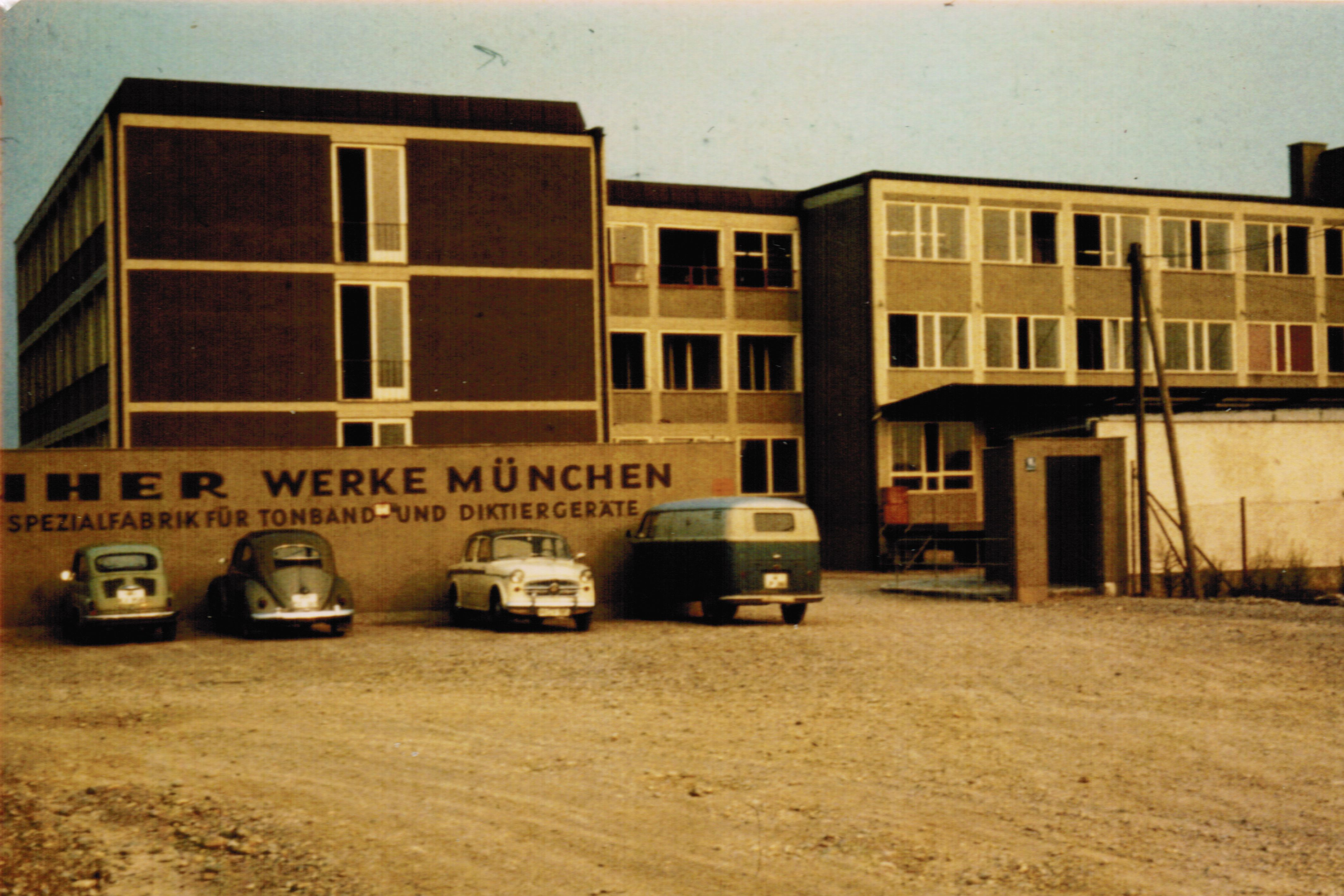 Uher-Werke München-Obersendling, Barmseestr. 11 (1962)